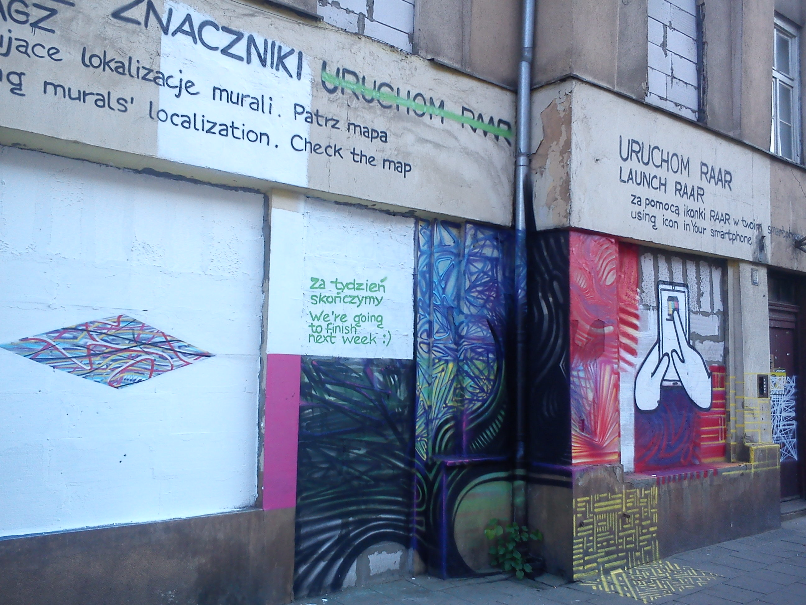 Poznań, ul. Górna Wilda, mural z 2012.